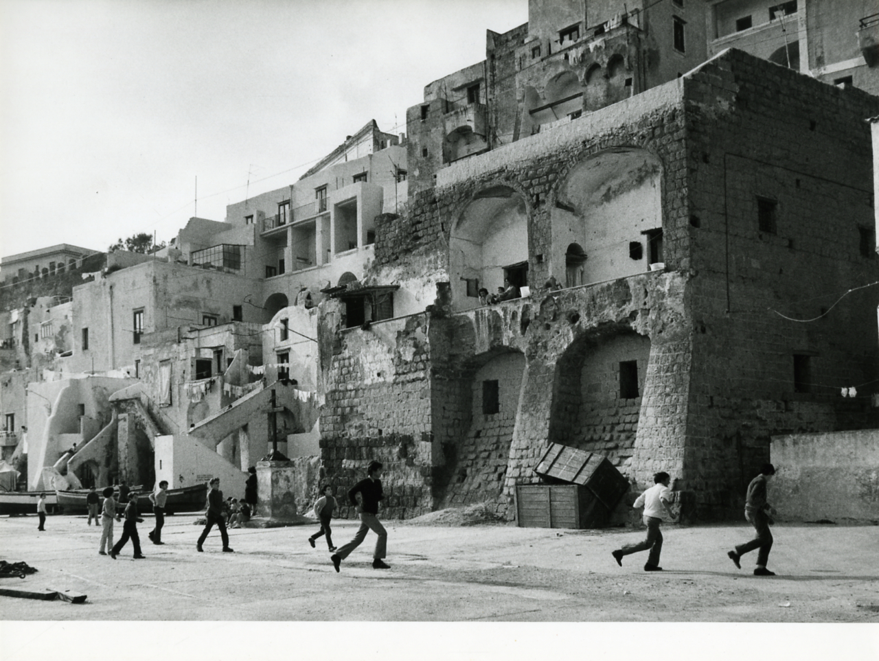 Procida (isola di). Architettura spontanea. Case e centro abitato. Servizio fotografico : Procida, 1972 / Paolo Monti. - Stampe: 3 : Positivo b/n, gelatina bromuro d'argento/ carta, 24x30. - ((Al verso delle stampe manoscritti i numeri dei negativi corrispondenti (formato 35 mm) con indicazione del fotogramma: 1896/24 (96/24), 1896/30, 1898/4. - Quando presente la numerazione altra è verosimilmente il riferimento al negativo corrispondente, scritto in forma abbreviata. - timbro a inchiostro con copyright: "© Copyright/ Credit to/ Paolo Monti/ Corso Sempione [...]/ Milano". - Sul coperchio della scatola iscrizione didascalica manoscritta a pennarello nero: "Procida". - Occasione: Documentazione per uno studio fotografico sull'architettura dell'isola (non pubblicata). - Fonte: Quaderno di Paolo Monti: Leica 1501-3000 Controllo numerazione (1950-1978), presso Archivio Paolo Monti. - Fonte: Agenda di Paolo Monti: Monti - Agenda 1972 (1972/04/01), presso Archivio Paolo Monti. - Fonte: Lettera di Paolo Monti: XII. Documenti vari 1982-2000/ Procida (1968), presso Archivio Paolo Monti. Corrispondenza tra l'Architetto Giancarlo Cosenza e Paolo Monti sul progetto di pubblicazione di uno studio fotografico sull'architettura dell'isola di Procida